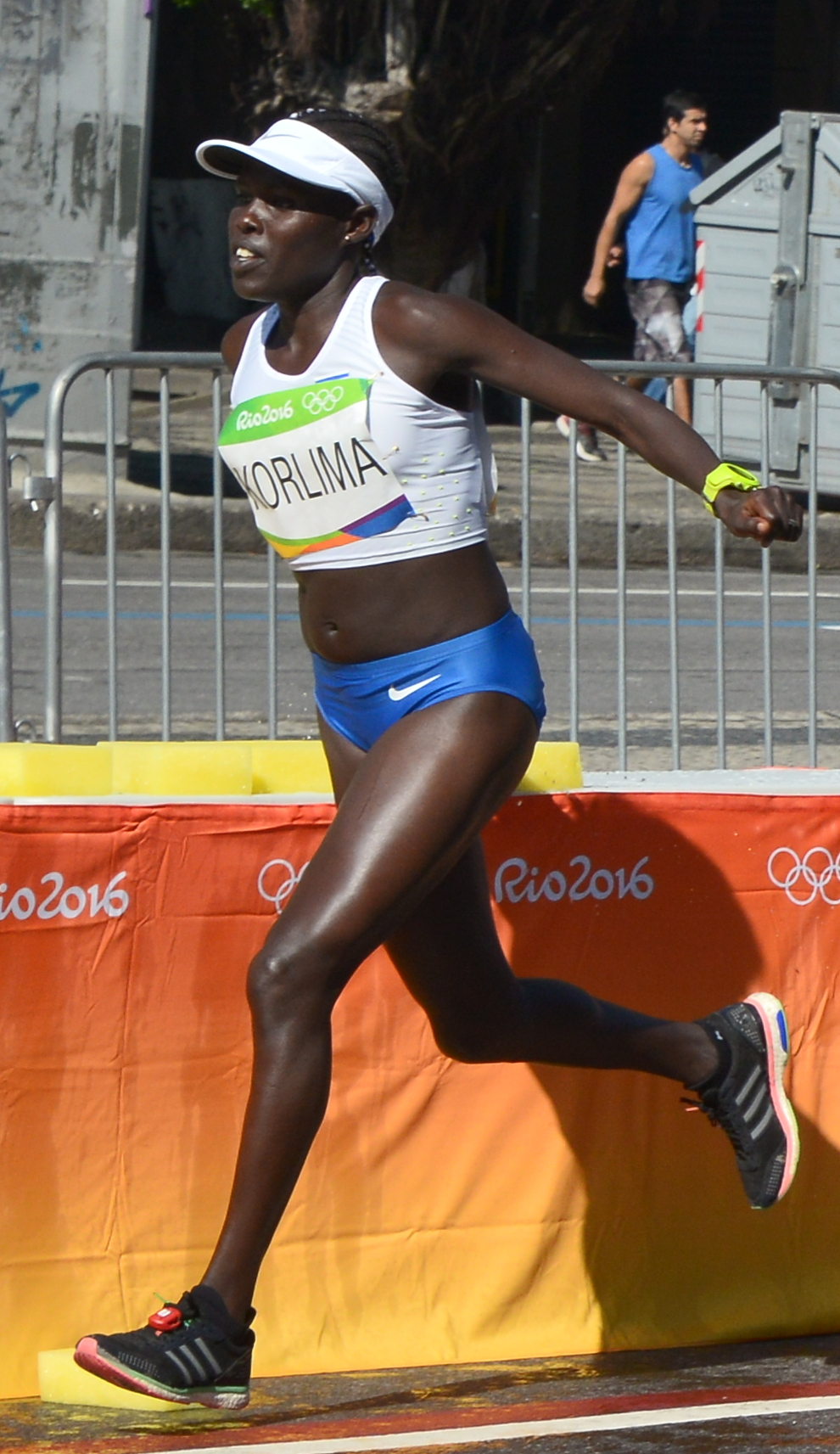 Passage du marathon des jeux olympiques de Rio 2016 dans le centre de Rio